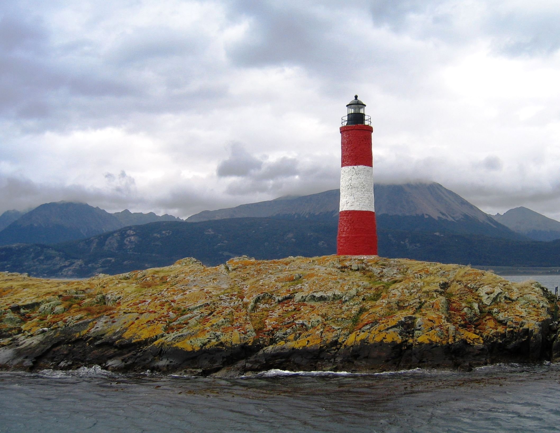 Terra del Foc - Far de la fi del món